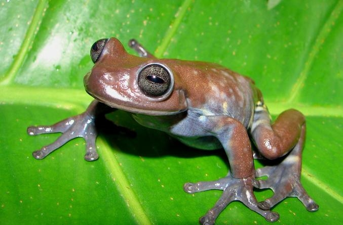 Hyloscirtus larinopygion